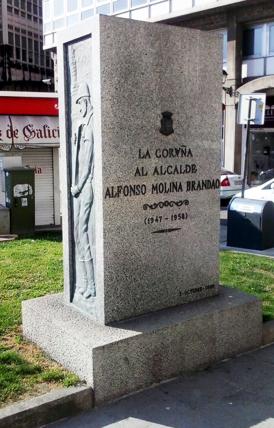 Monumento homenaxe a Alfonso Molina no porto da Coruña